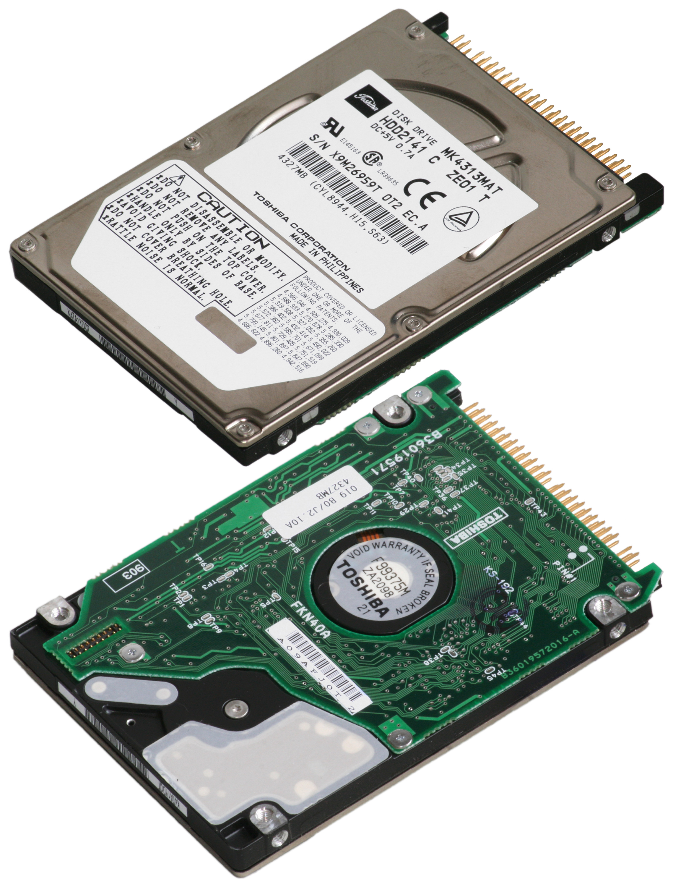 Dieses Bild eine 2,5 Zoll Festplatte. Toshiba MK4313MAT - 4,3 GB.